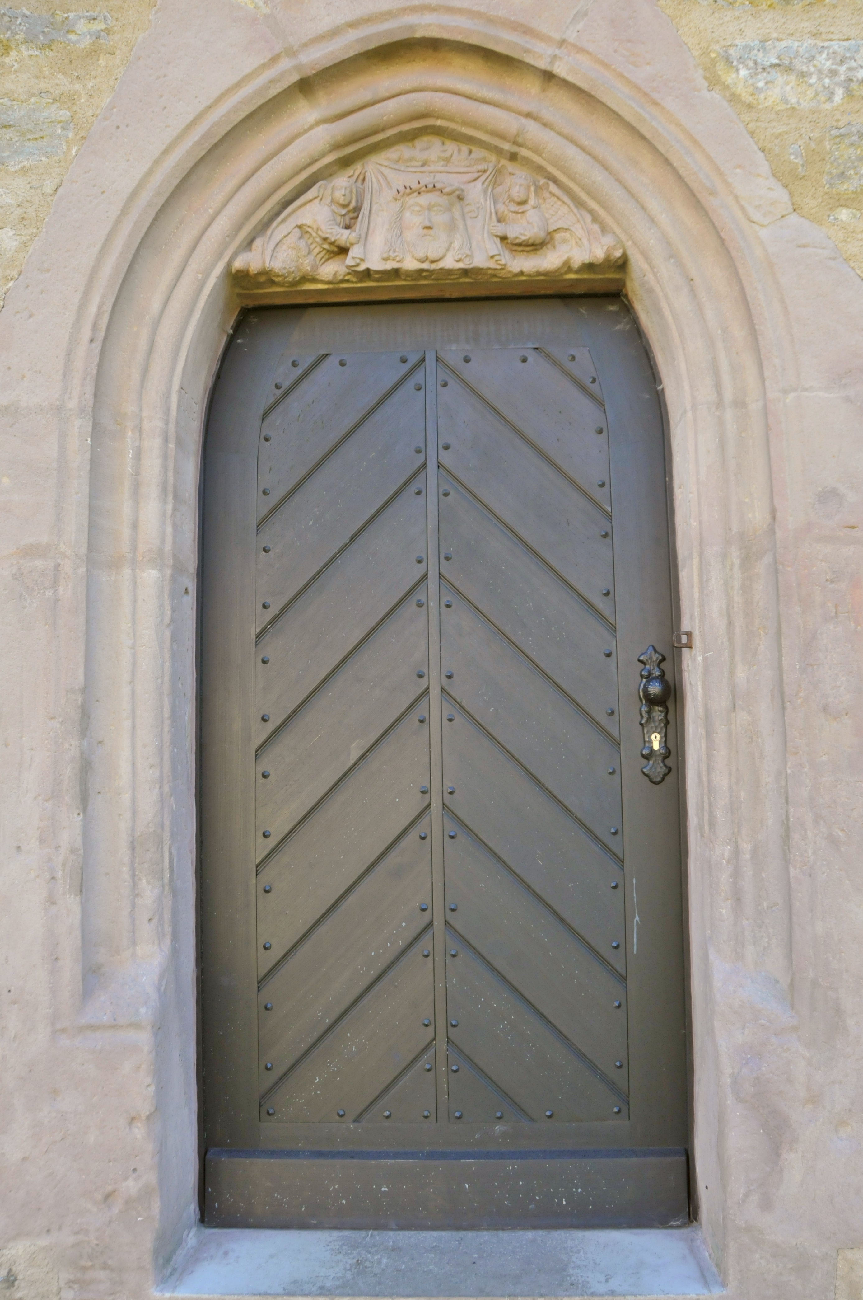 Forsthaus Willroda, gotischer Eingang zur Kapelle